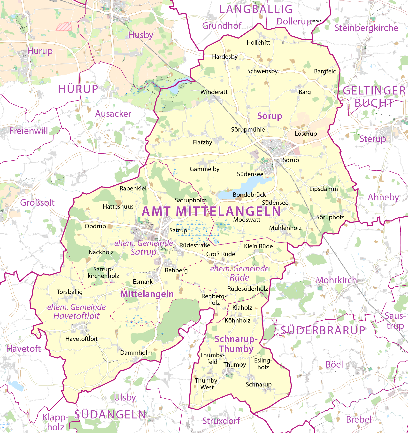 Karte des Amts Mittelangeln mit den Gemeinden Mittelangeln, Sörup und Schnarup-Thumby sowie den zugehörigen Ortsteilen